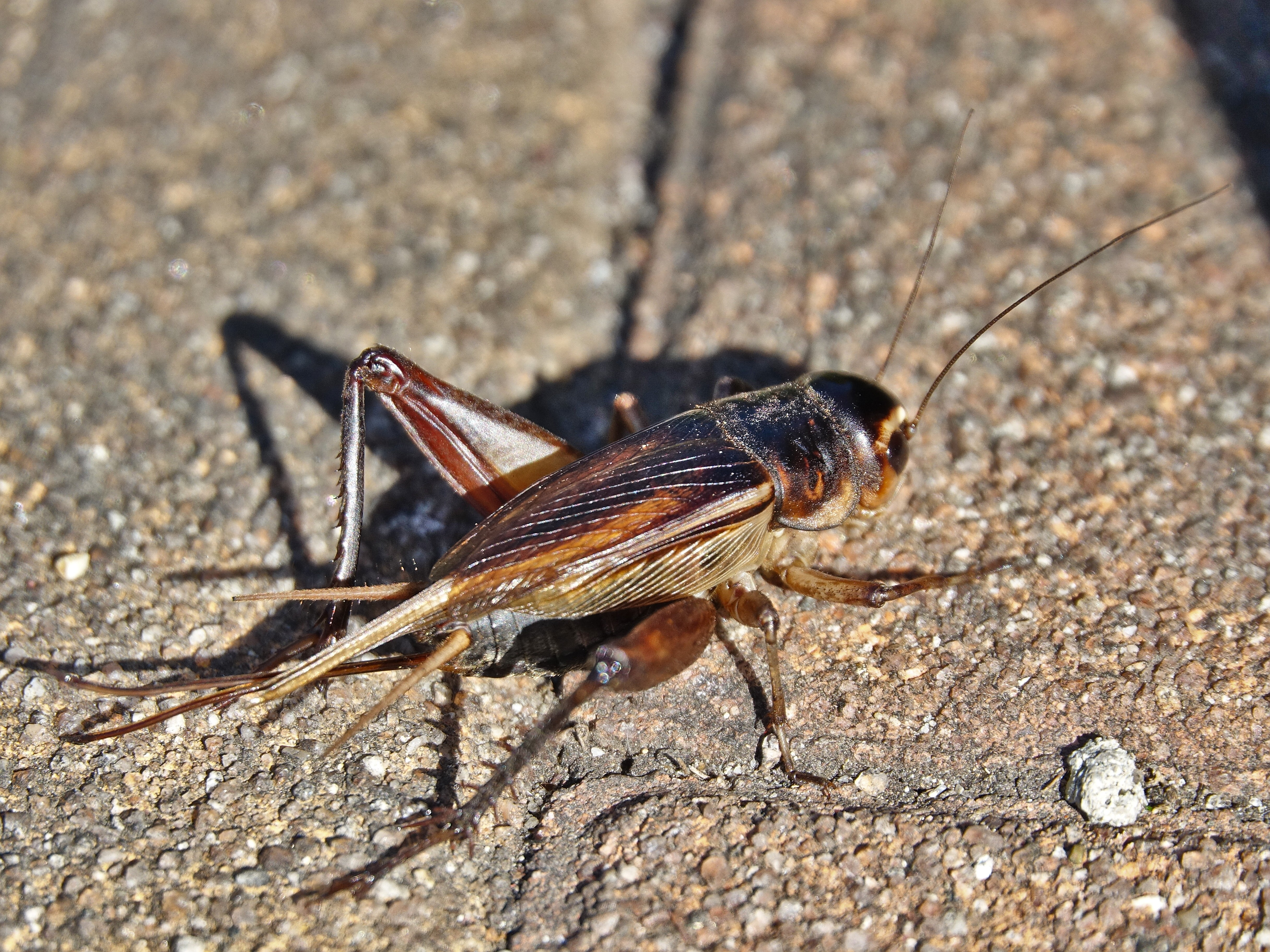 エンマコオロギのメス 日本、東海地方